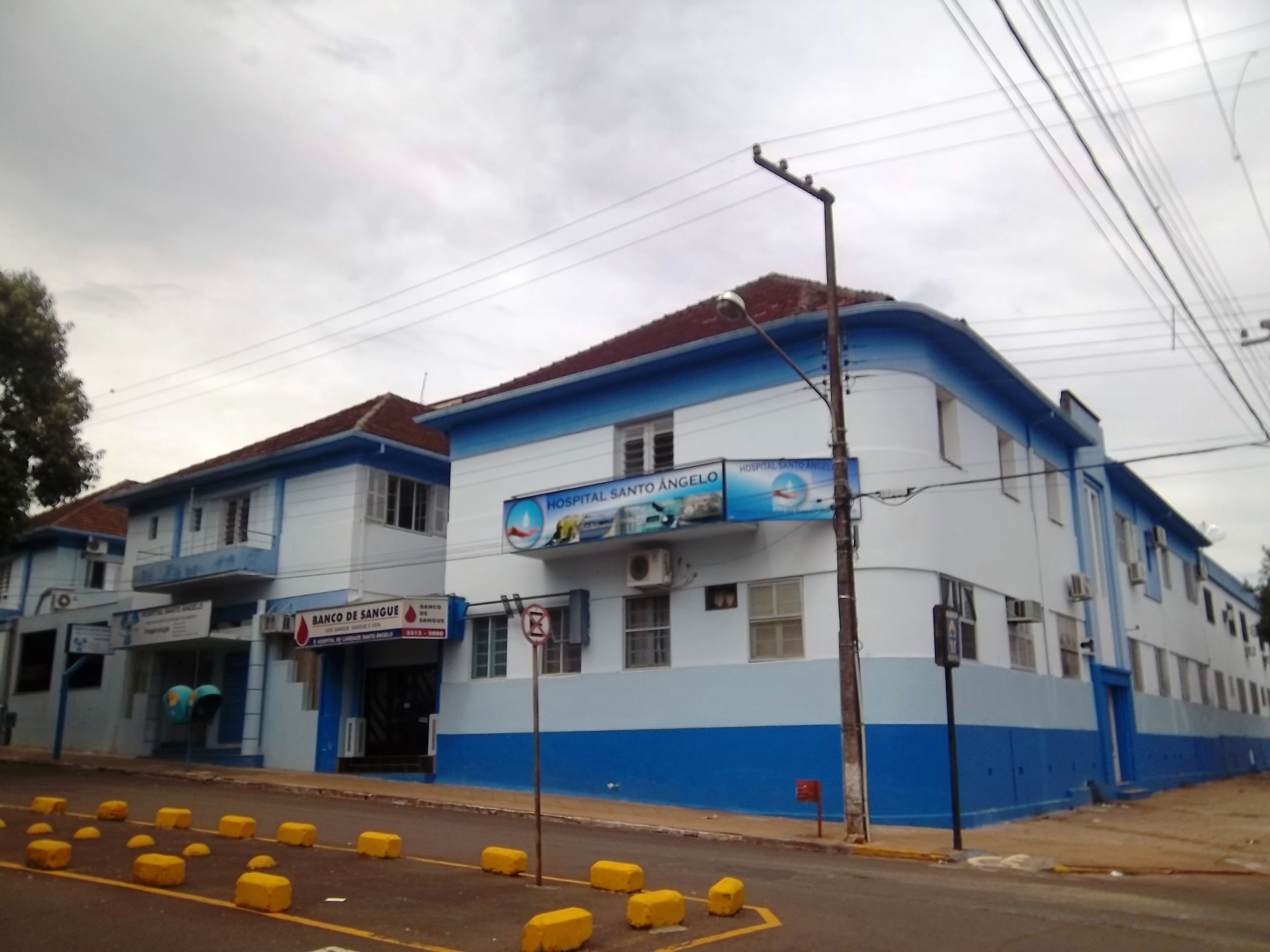 Vista externa do Hospital de Caridade de Santo Ângelo, Rio Grande do Sul.